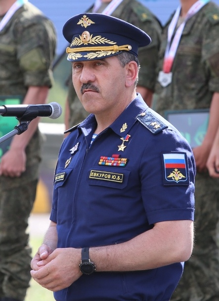 Замминистра обороны России генерал-лейтенант Юнус-Бек Евкуров во время награждения победителей и призеров конкурса «Снайперский рубеж» в Белоруссии